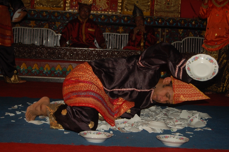 Acara pijak piring dalam Tarian Piring tidak menggunakan ilmu magis.